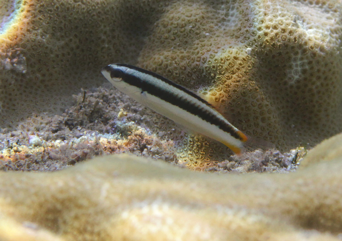 Thalassoma amblycephalum juvénile à la Réunion.